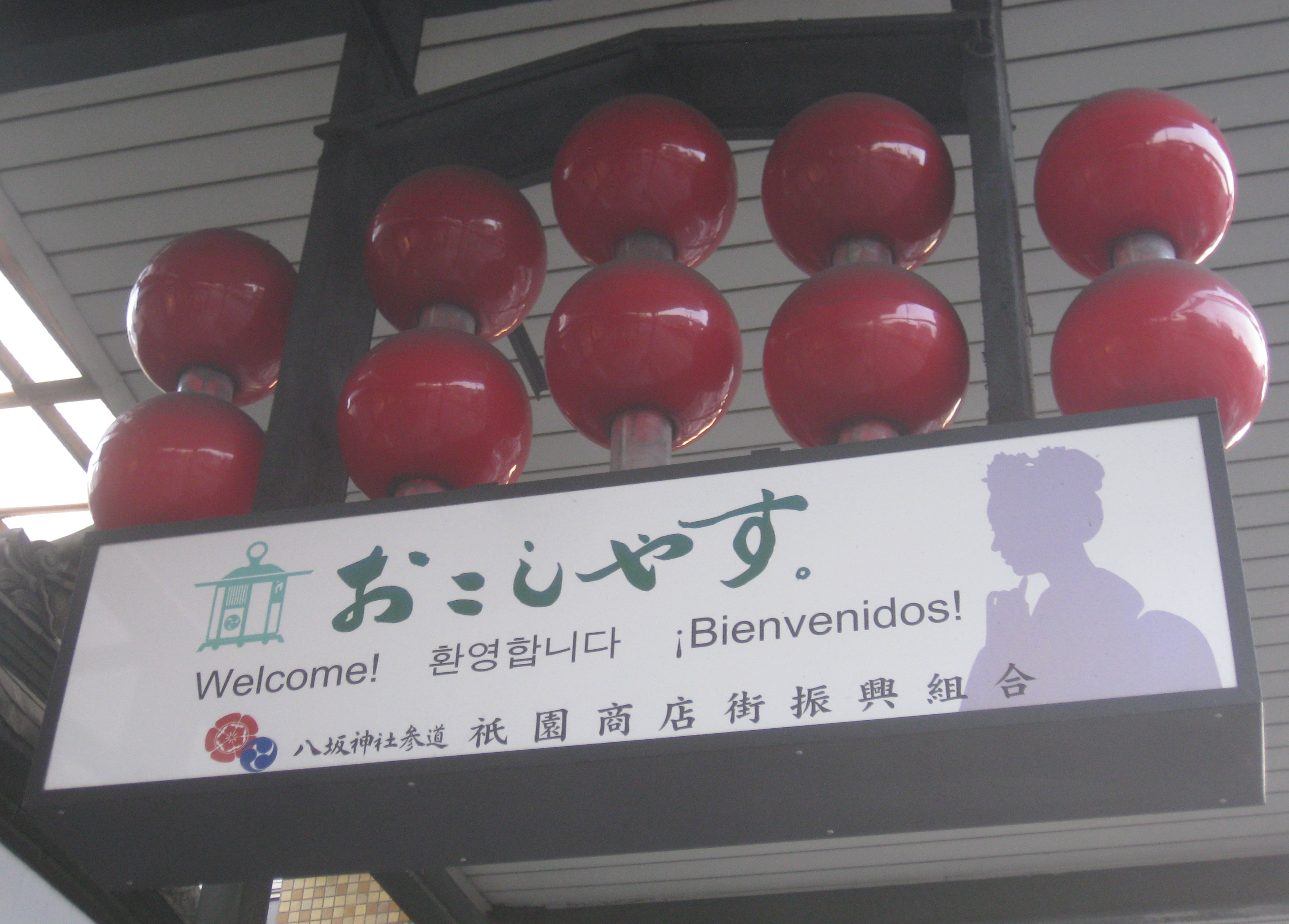 「おこしやす」と書かれた看板。東山区の祇園四条通にて。